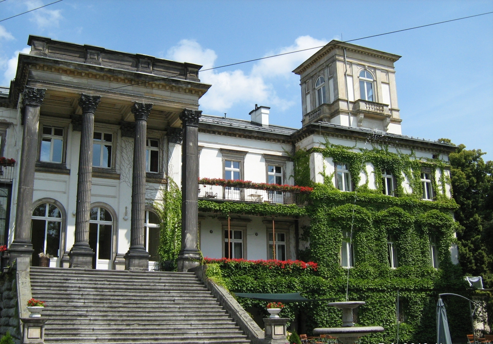 Schloss Muhrau/Morawa, Niederschlesien, Polen